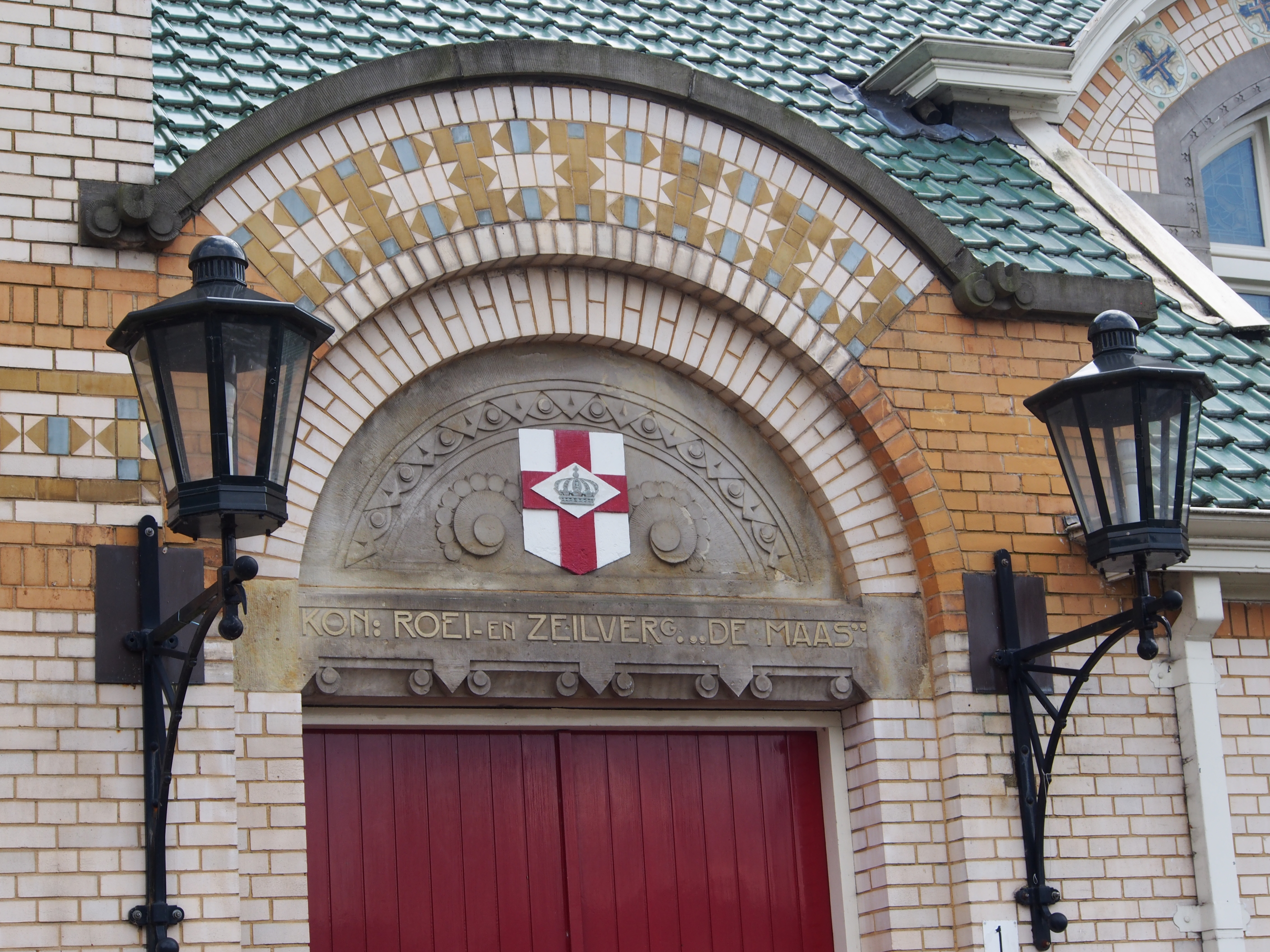 Kon. Roei- en Zeilvereniging 'De Maas' Rotterdam